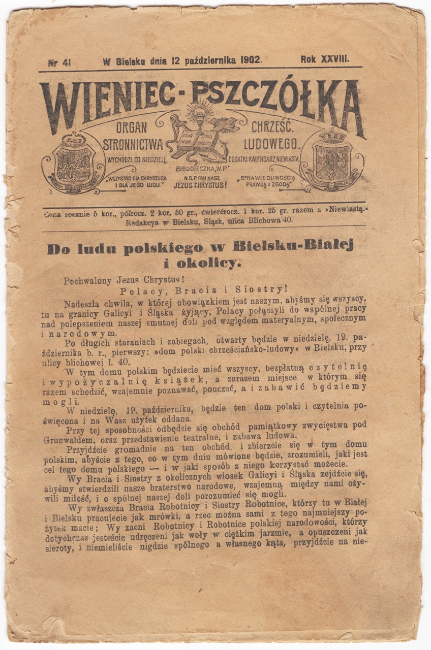 Czasopismo "Wieniec - Pszczółka". Organ Stronnictwa Chrześcijańsko-Ludowego, Bielsko, 1902 r. ze zbiorów Muzeum Historycznego w Bielsku-Białej